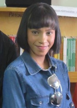 Maria Vitória Borges, kurz MarVi